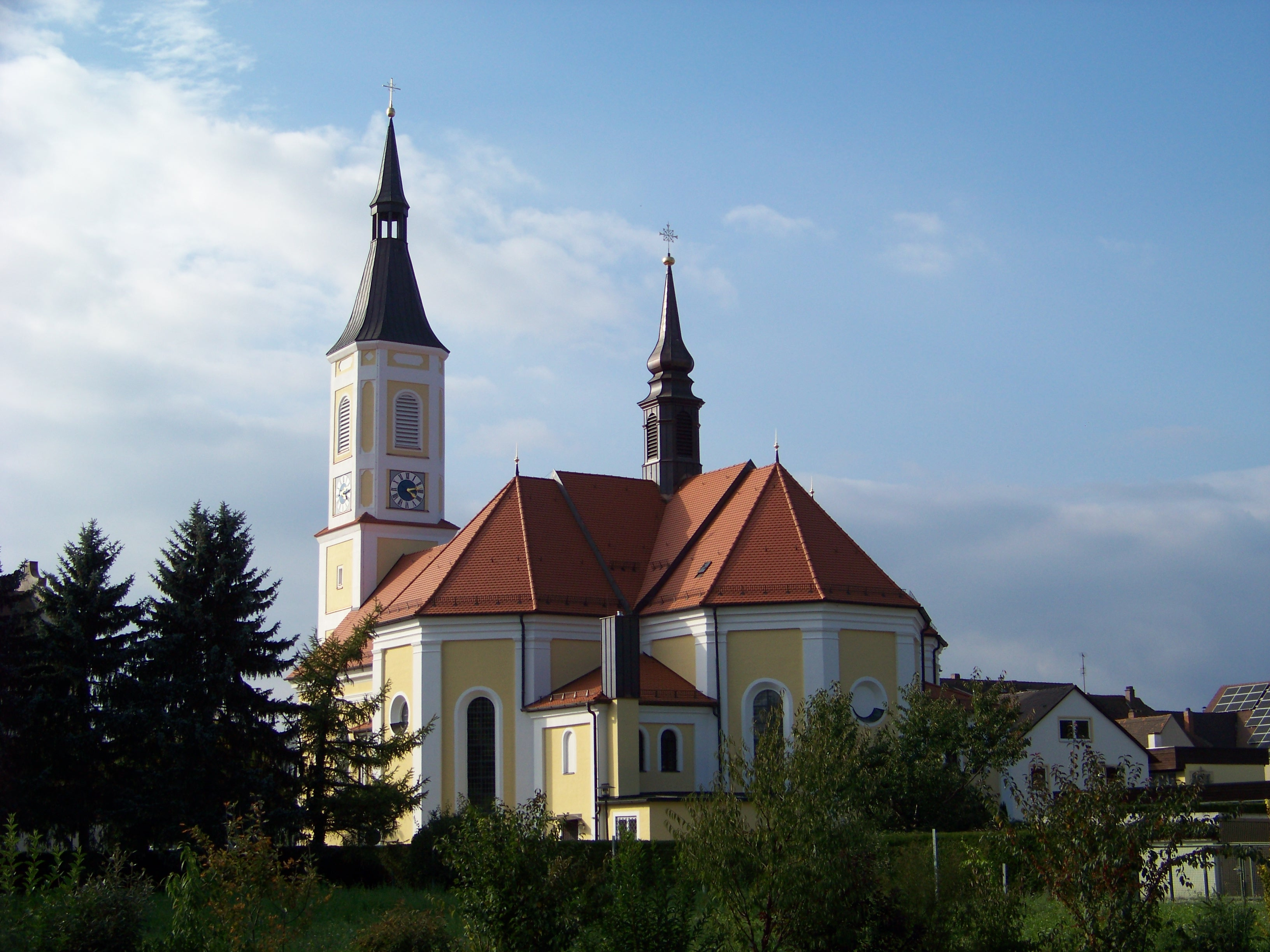 Ergoldsbach, Hauptstraße-18. Katholische Pfarrkirche St. Peter und Paul, erbaut 1729, Chor und Querhaus 1886/87; mit Ausstattung. Ansicht von Osten.